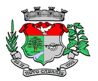 Brasão de Novo Cabrais, no Rio Grande do Sul, Brasil